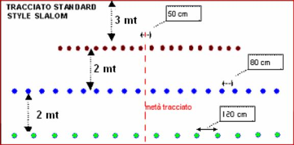 Schema posizione dei coni